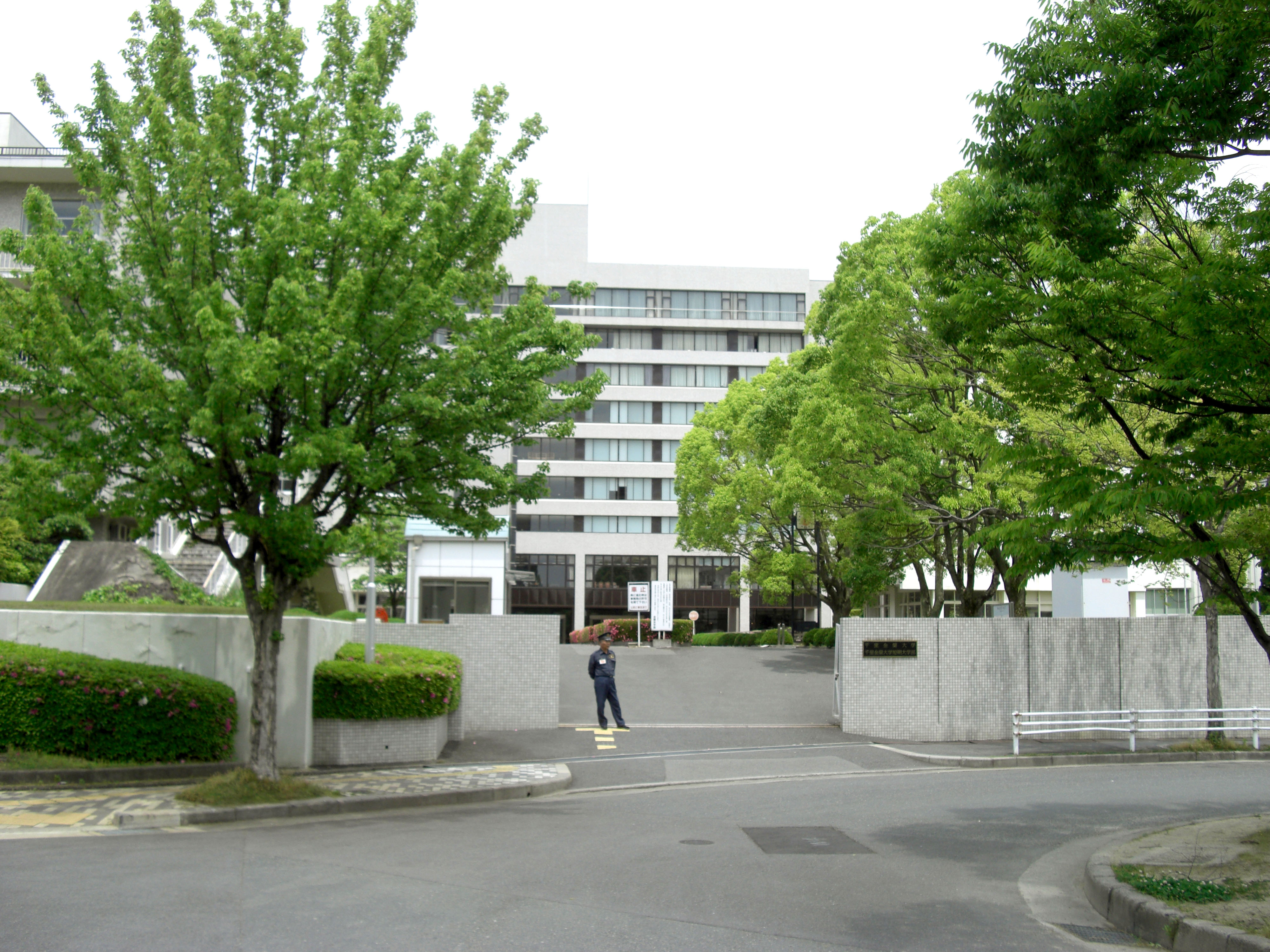 Senri Kinran University,Fujishirodai Suita-City Osaka Japan.